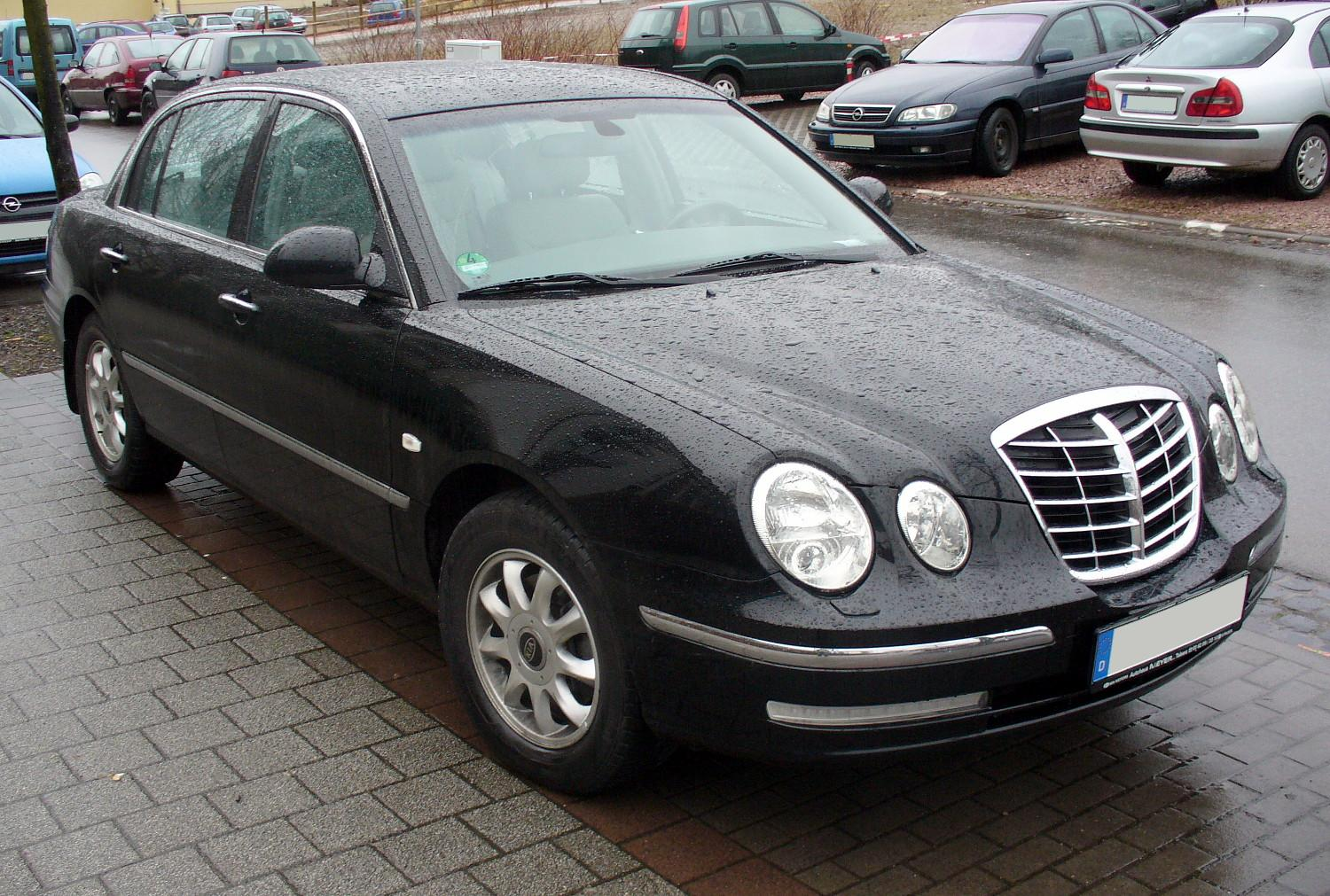 Kia Opirus pre-facelift